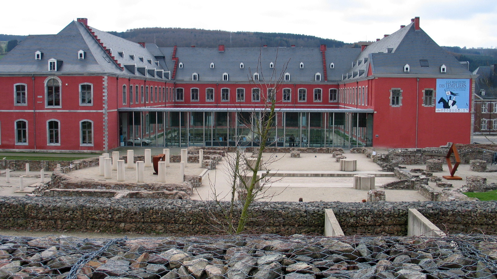 De abdij van Stavelot, België